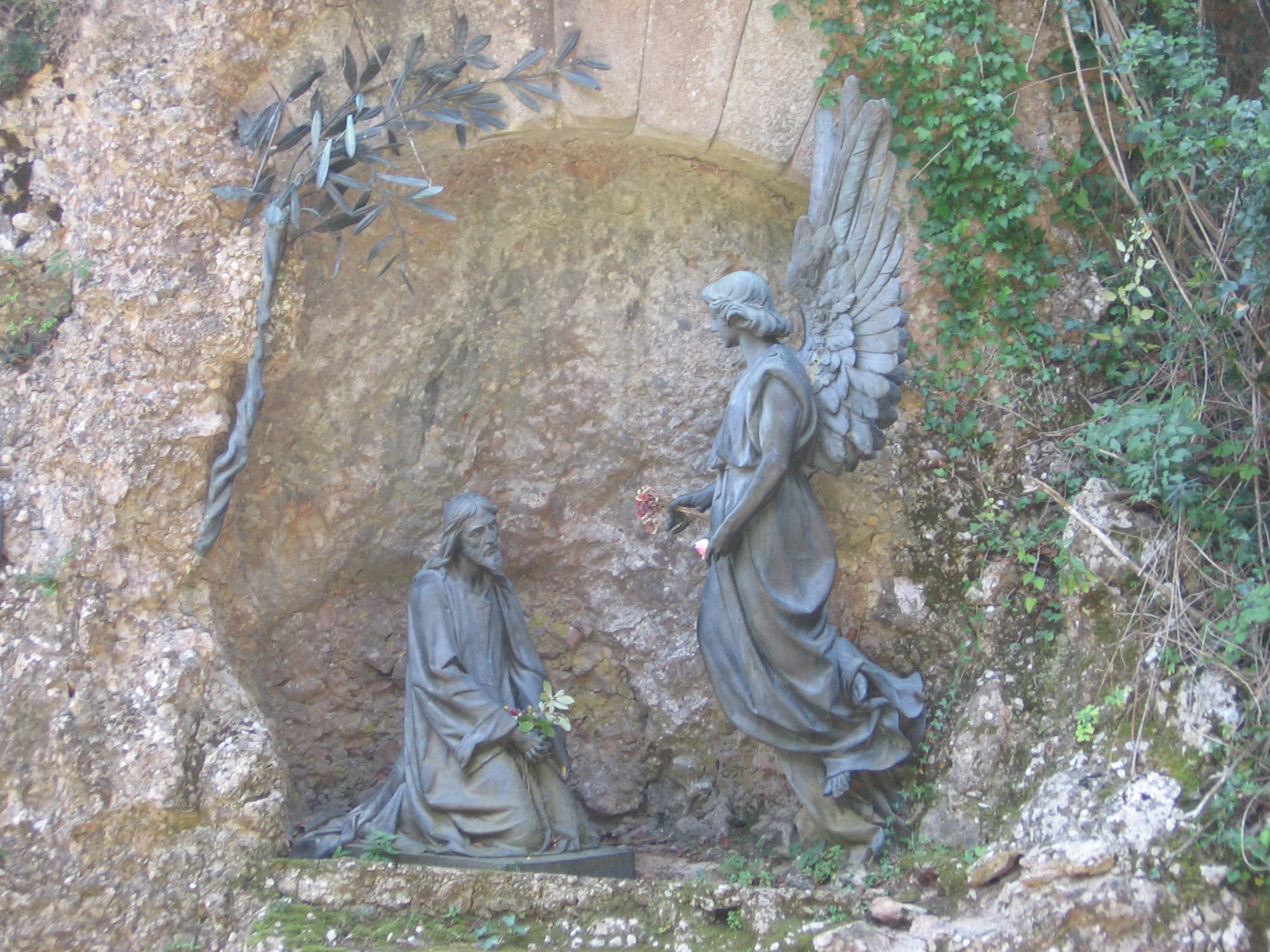 Rosario Monumental de Montserrat: Primer Misterio de Dolor. La Oración de Jesús en el Huerto de Getsemaní. Obra de Joaquim Codina i Matalí con esculturas de Josep Campeny.